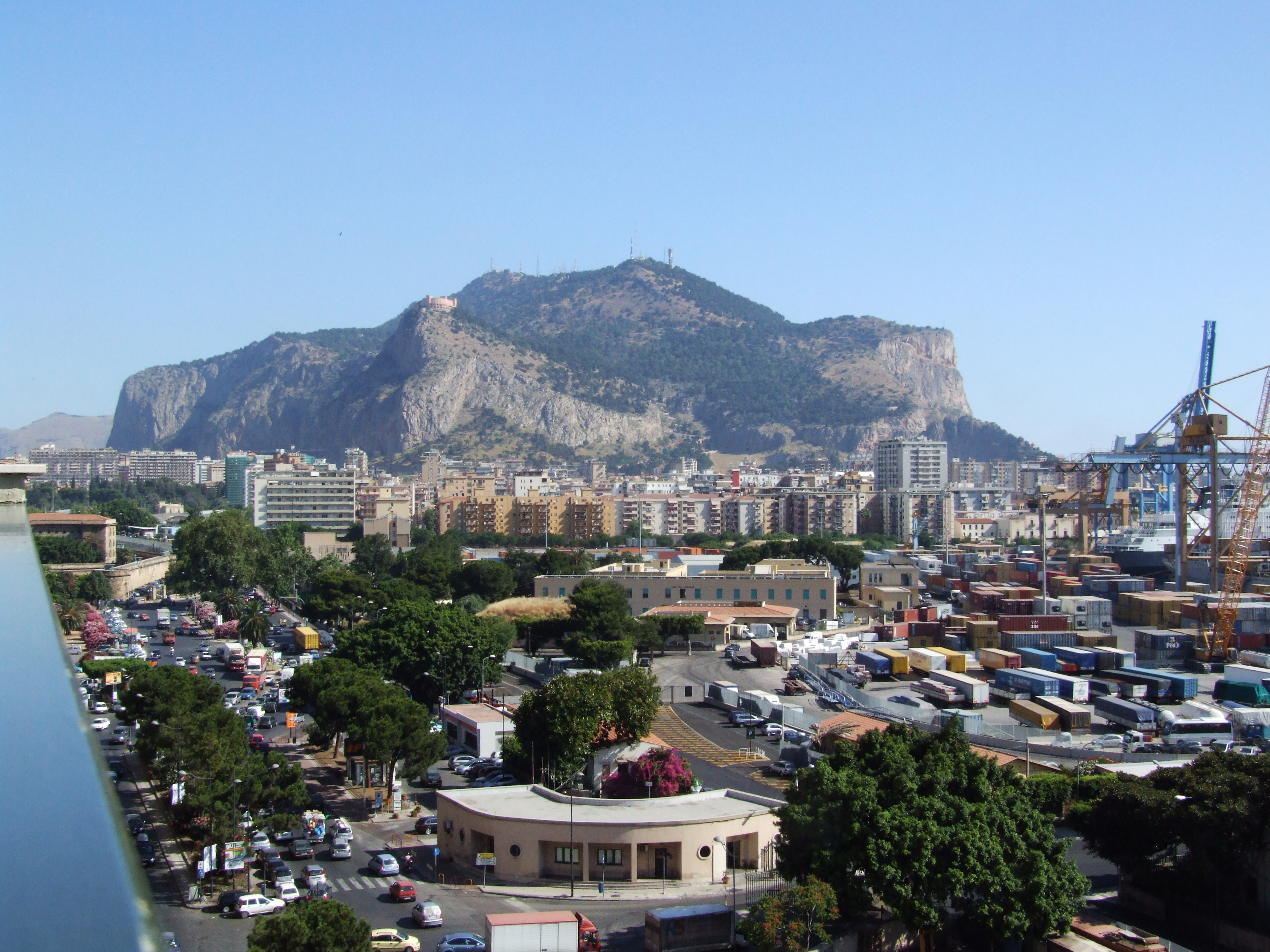 Palermo